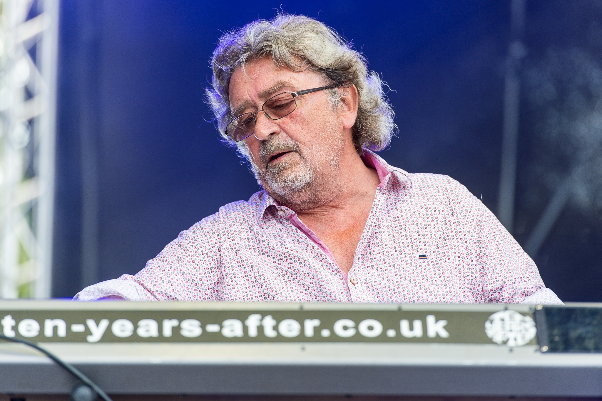 Chick Churchill,Concertbüro Franken,Festival,Konzert,Lieder am See,Livekonzert,Livemusik,Michael George Churchill,Musik,Ten Years After